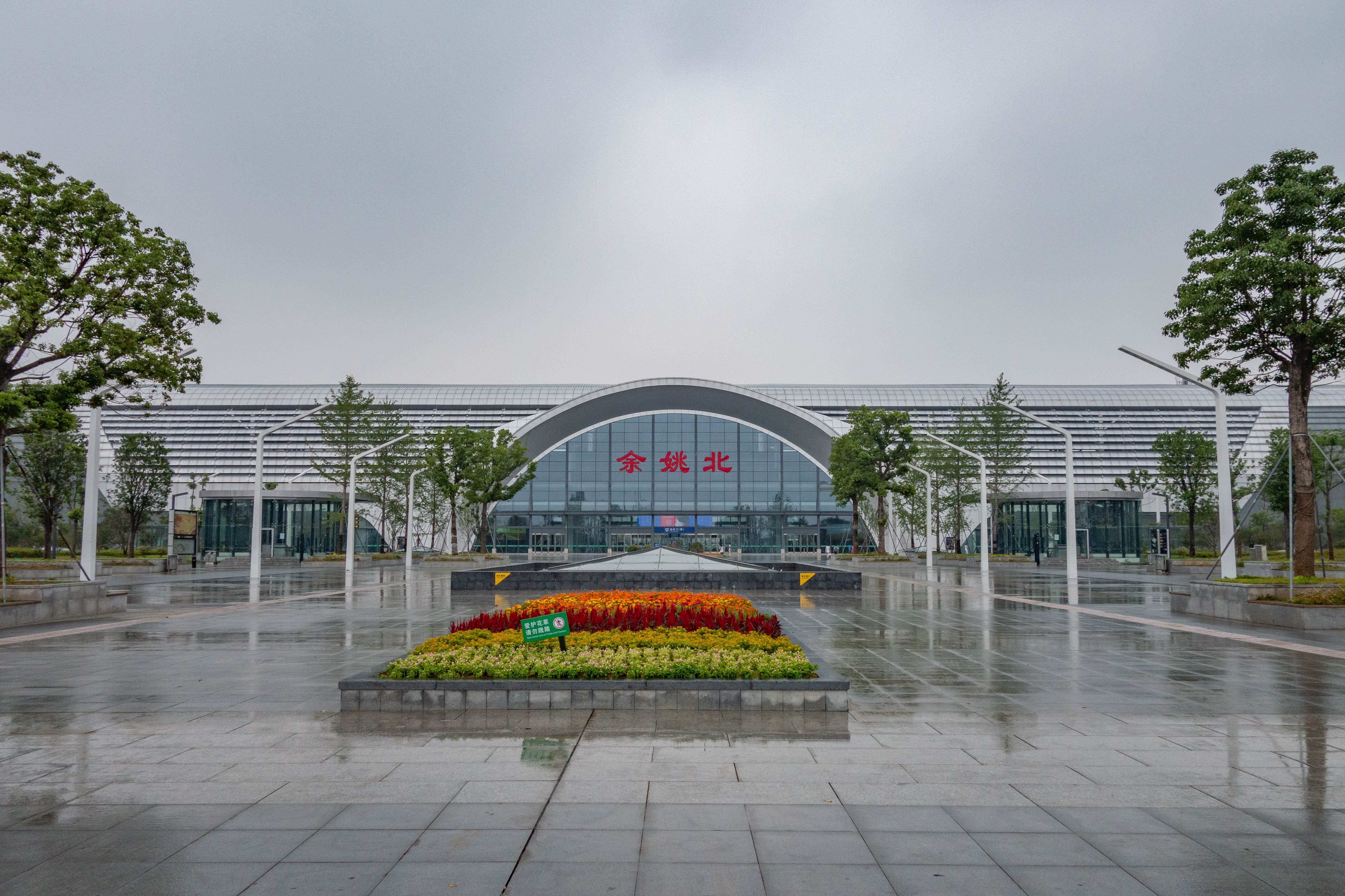 余姚北站正面